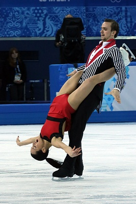 Ксения Столбова и Федор Климов на Зимних Олимпийских играх 2014